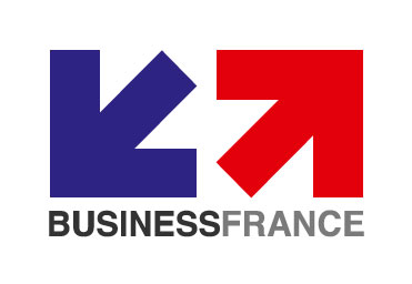 Logo BusinessFrance